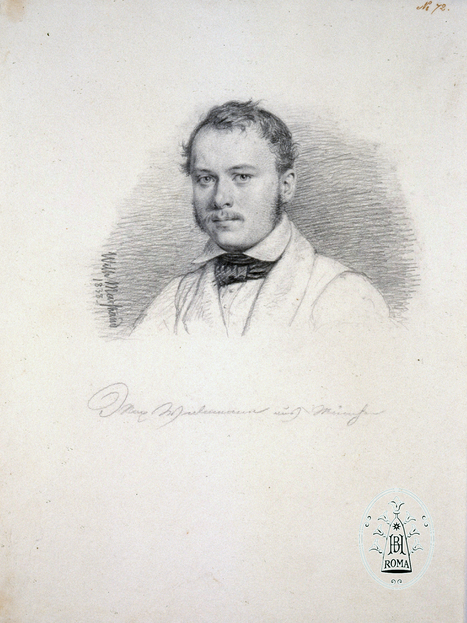 Porträt Max Ritter von Widnmann, gezeichnet von Wilhelm Nicolai Marstrand, Rom 1838